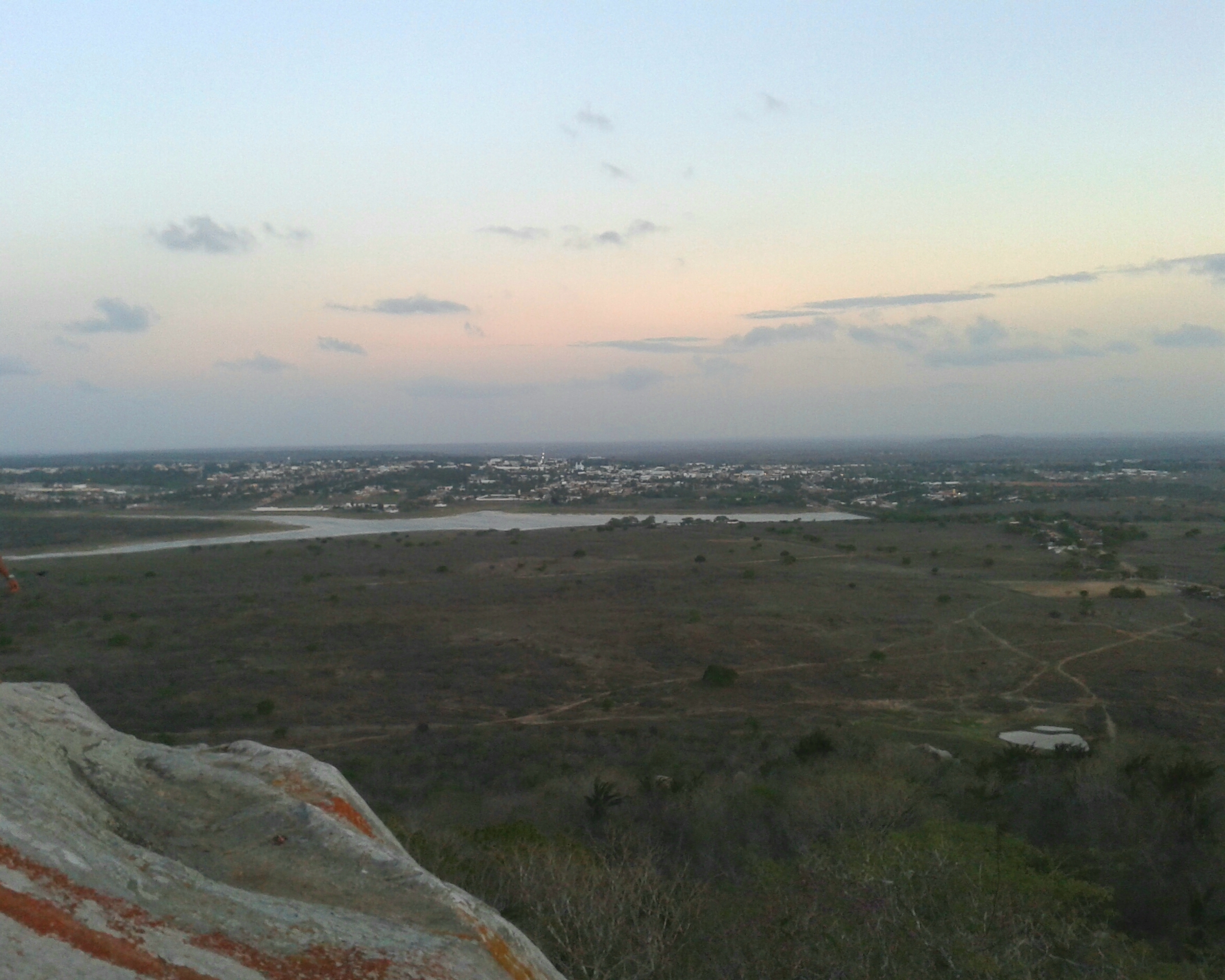 Vista da cidade de João Câmara RN no fim da tarde em janeiro de 2014